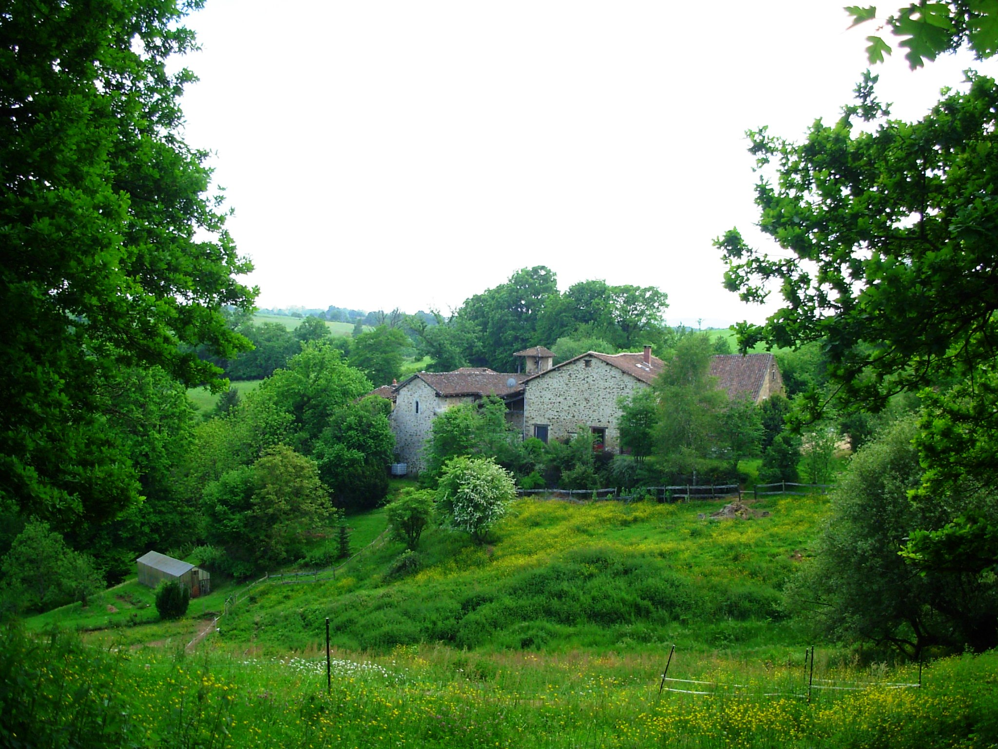 Flavignac, village de Texon